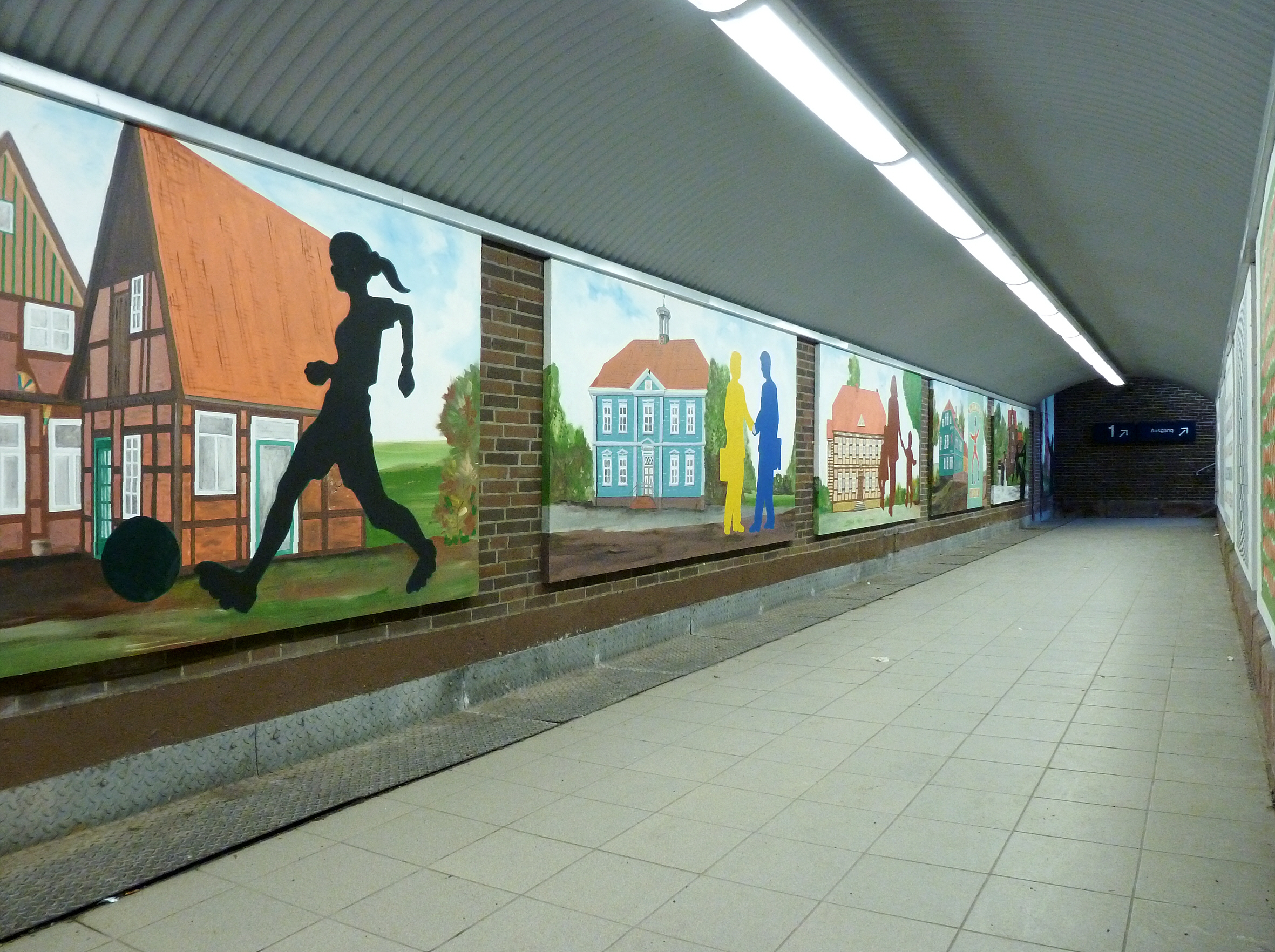 Fußgängertunnel zu den Bahnsteigen des Bahnhof Soltau, Niedersachsen, DE.